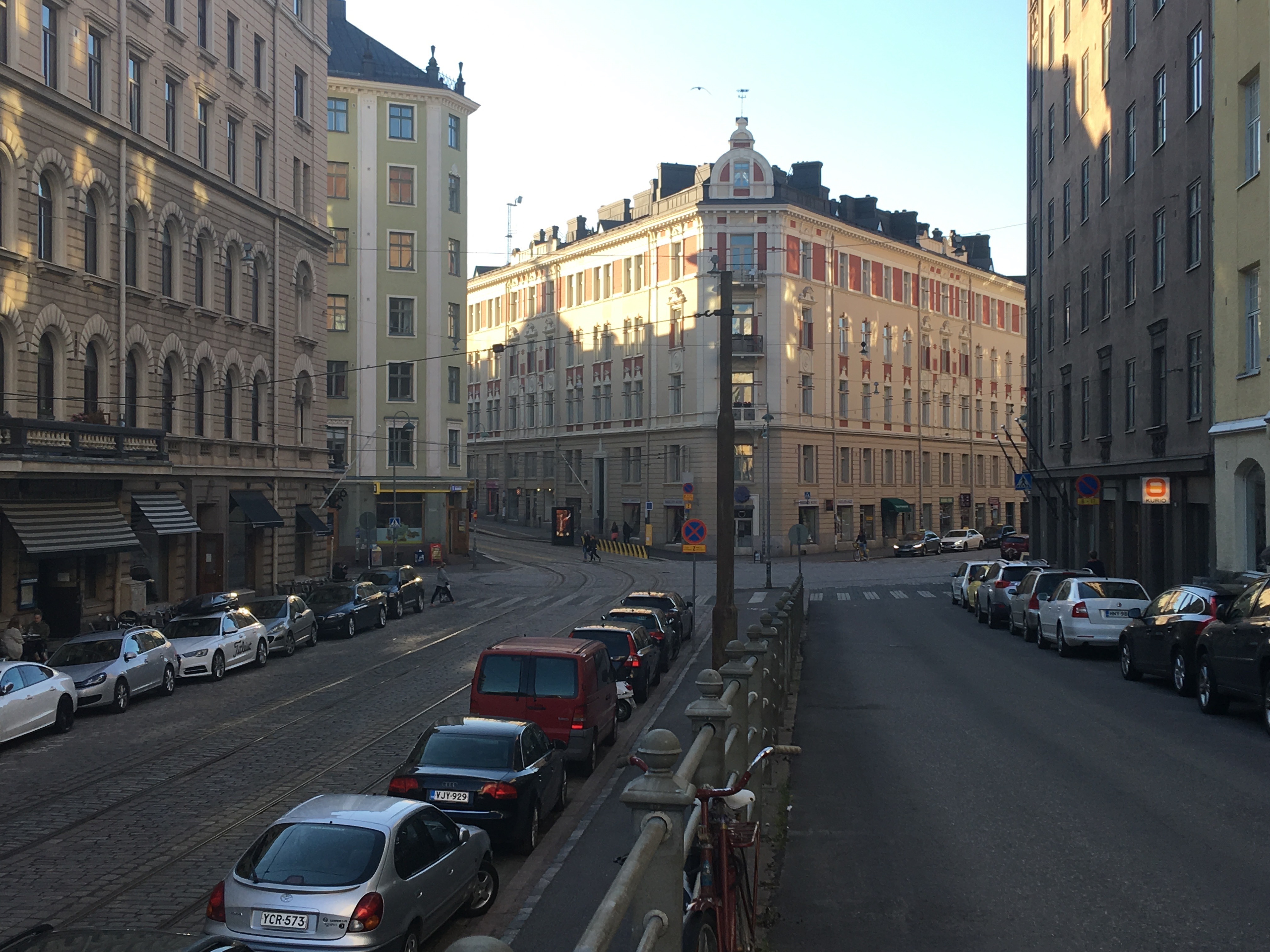 Viiskulma Helsingissä kuvattuna Laivurinkadult